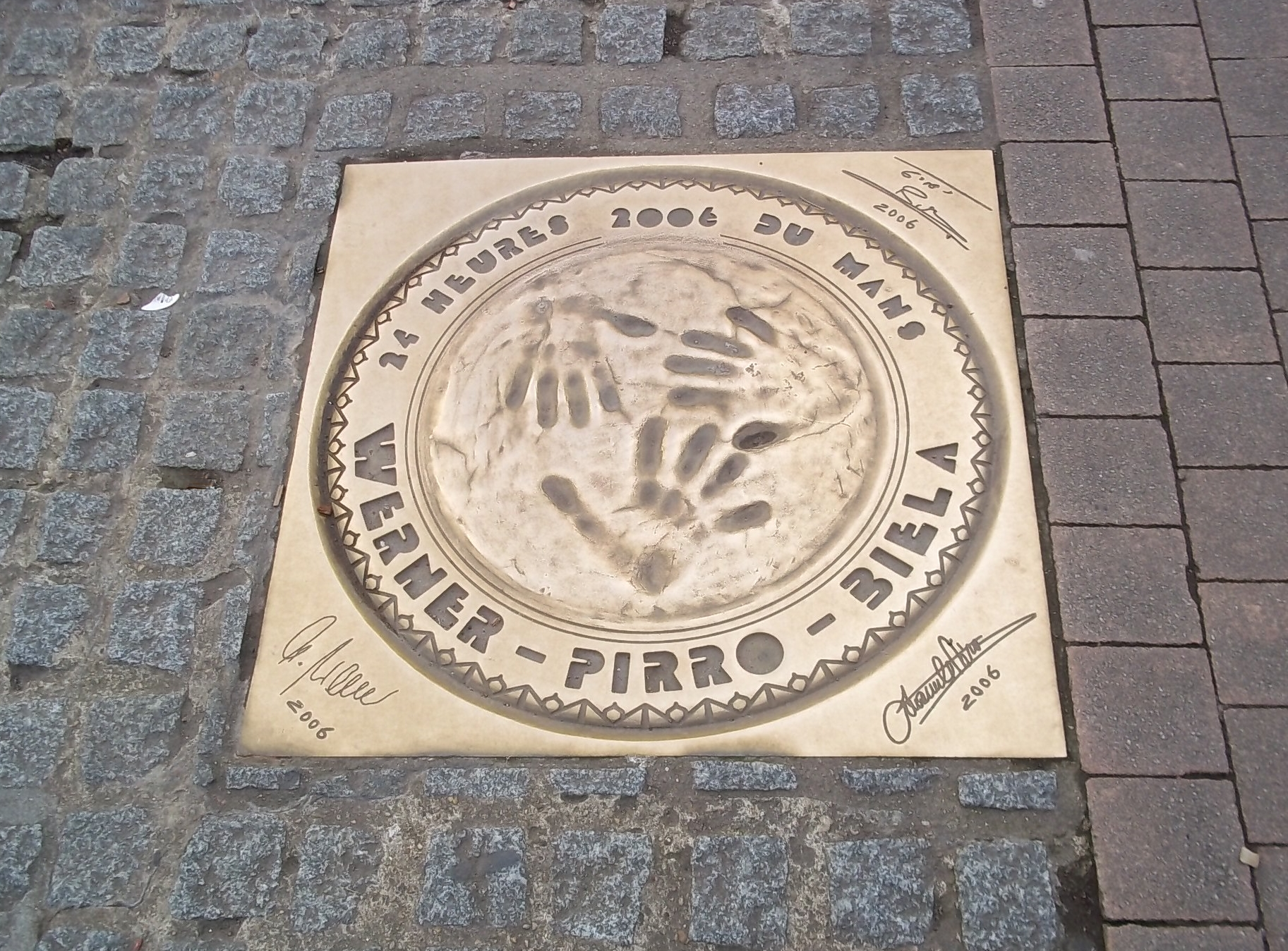 Plaque de bronze des empreintes des vainqueurs des 24 heures 2006